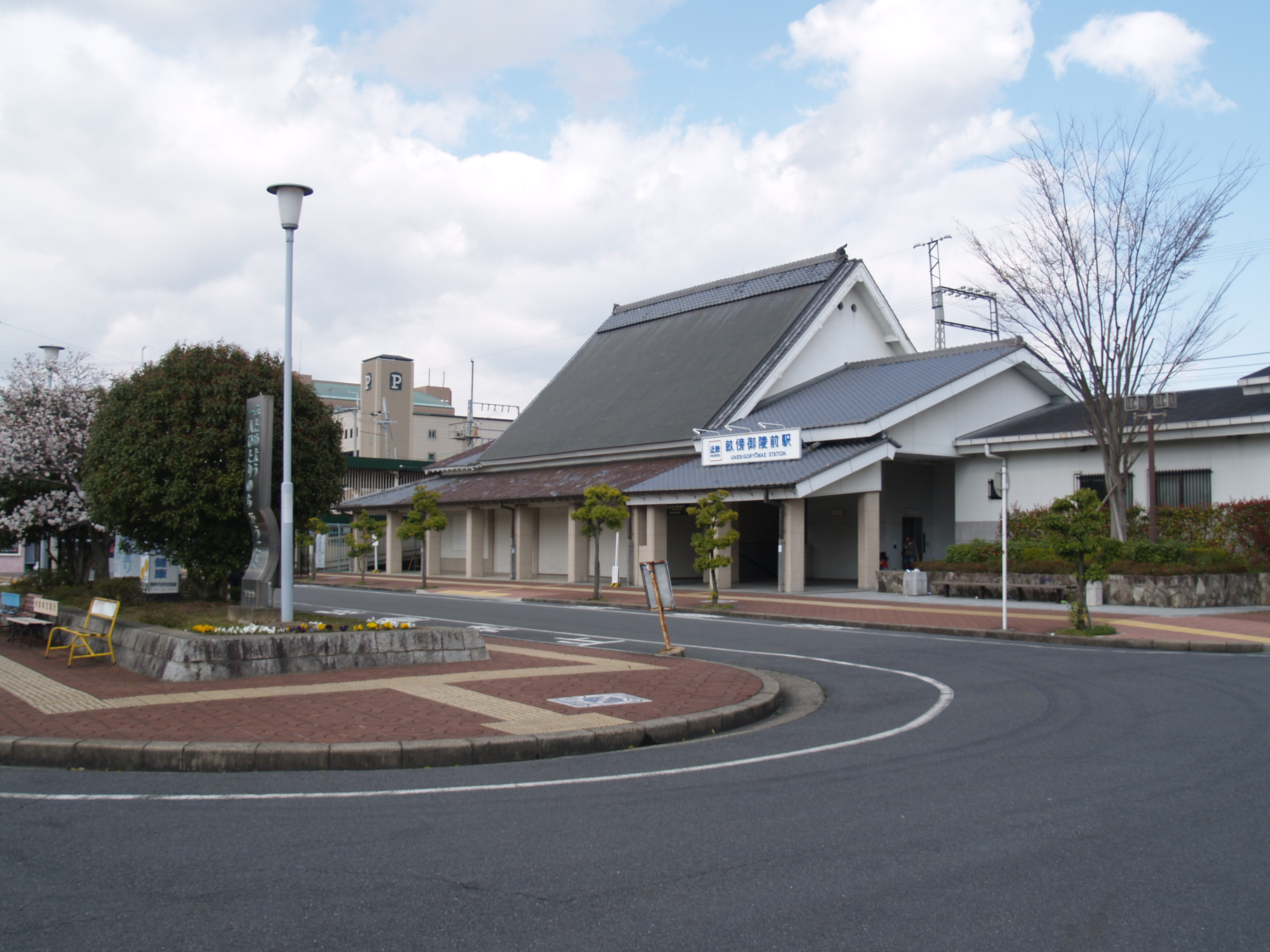 畝傍御陵前駅駅舎 (西側)